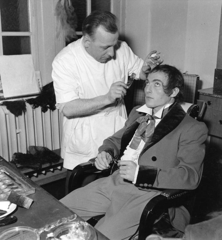 Fernsehstudio in Köln Maskenbildner Lange während der Arbeit